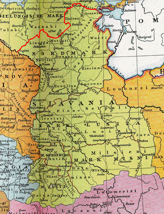 Heiliges Römisches Reich um 1000, Ausschnitt die Ostmark